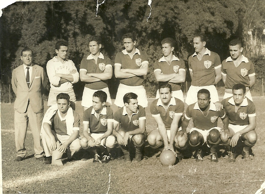 Jogo entre Guaxupé x Operários FC em Paraíso 2/7/61